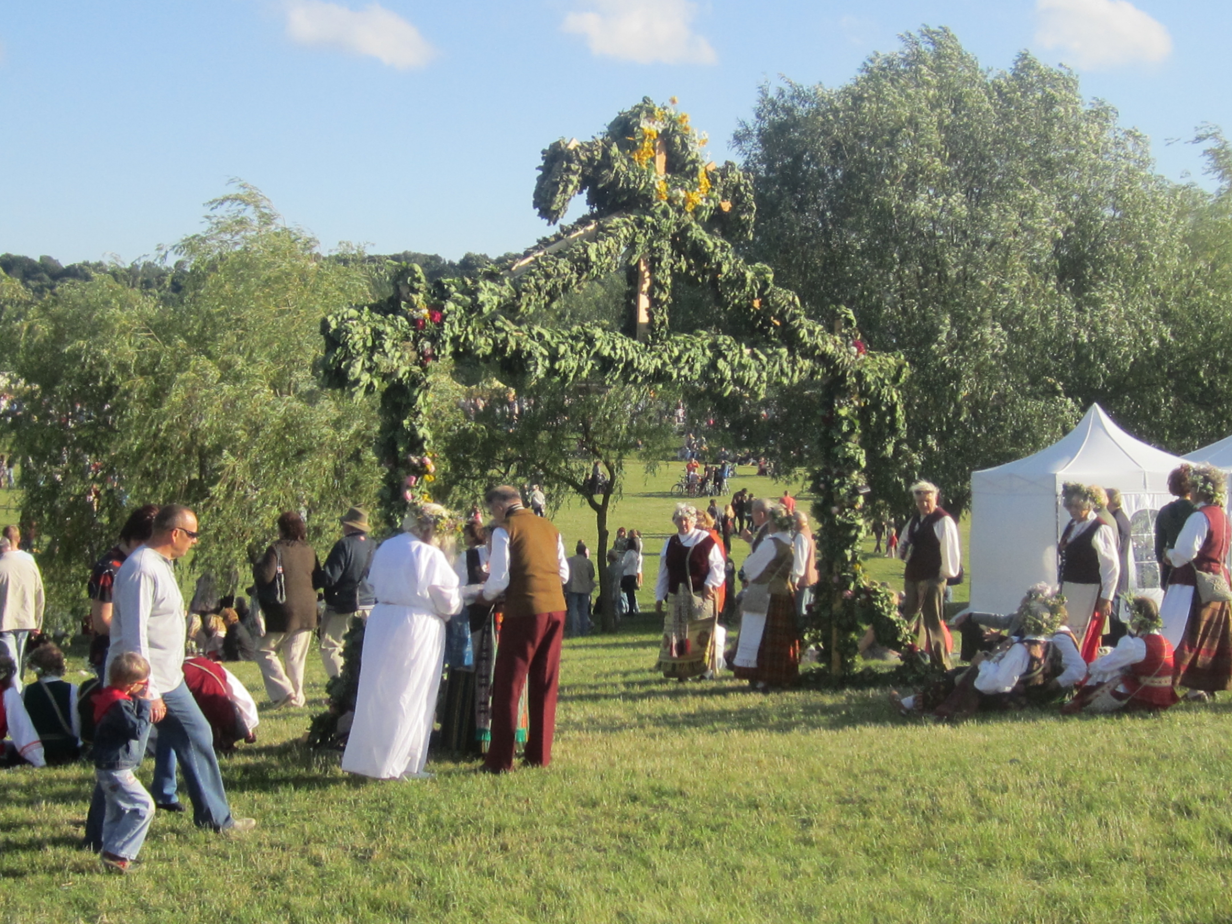 Joninės Nemuno saloje